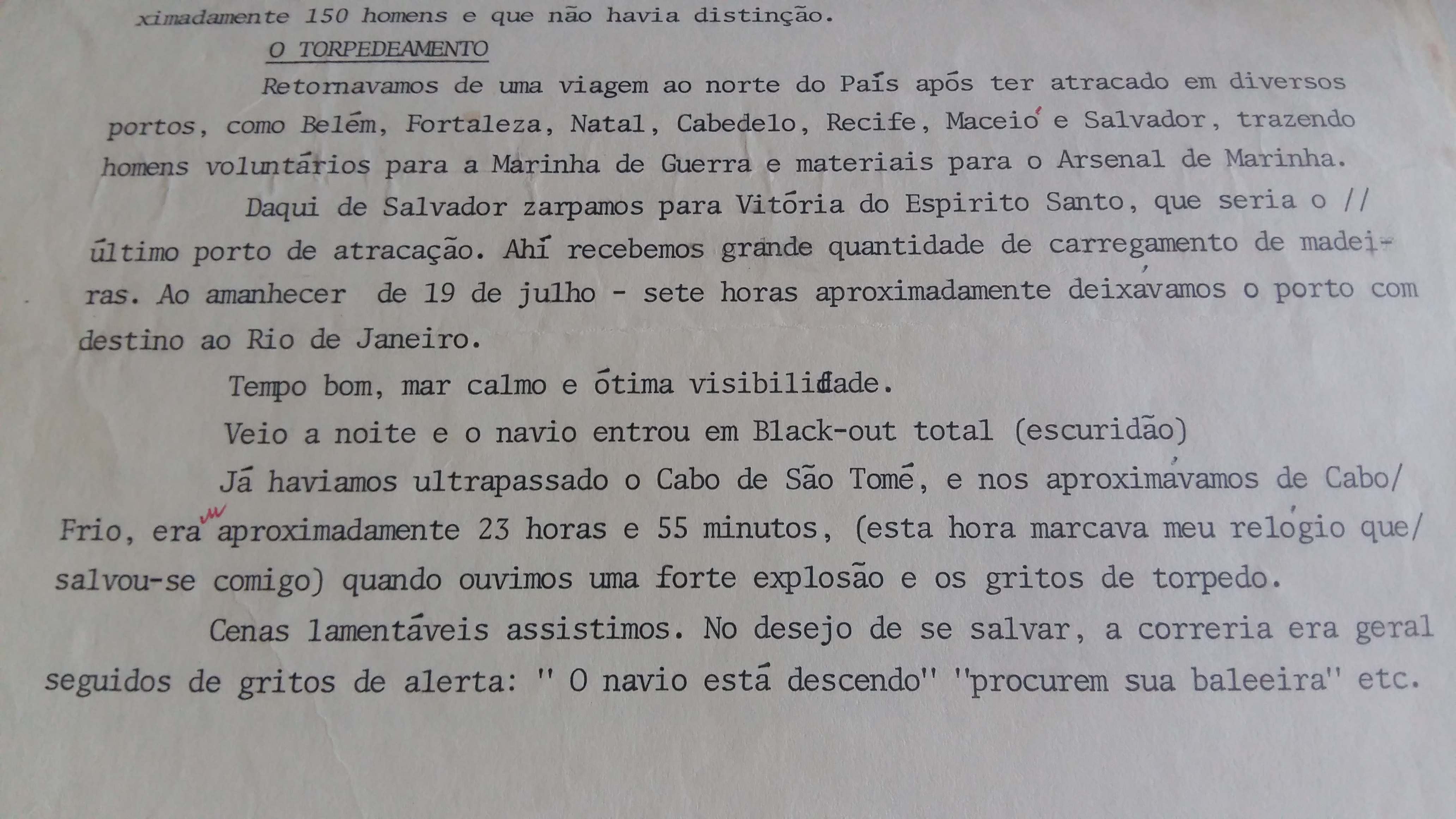 Carta do sobrevivente Oscar Gabriel Soares ao torpedeamento do navio Vital de Oliveira